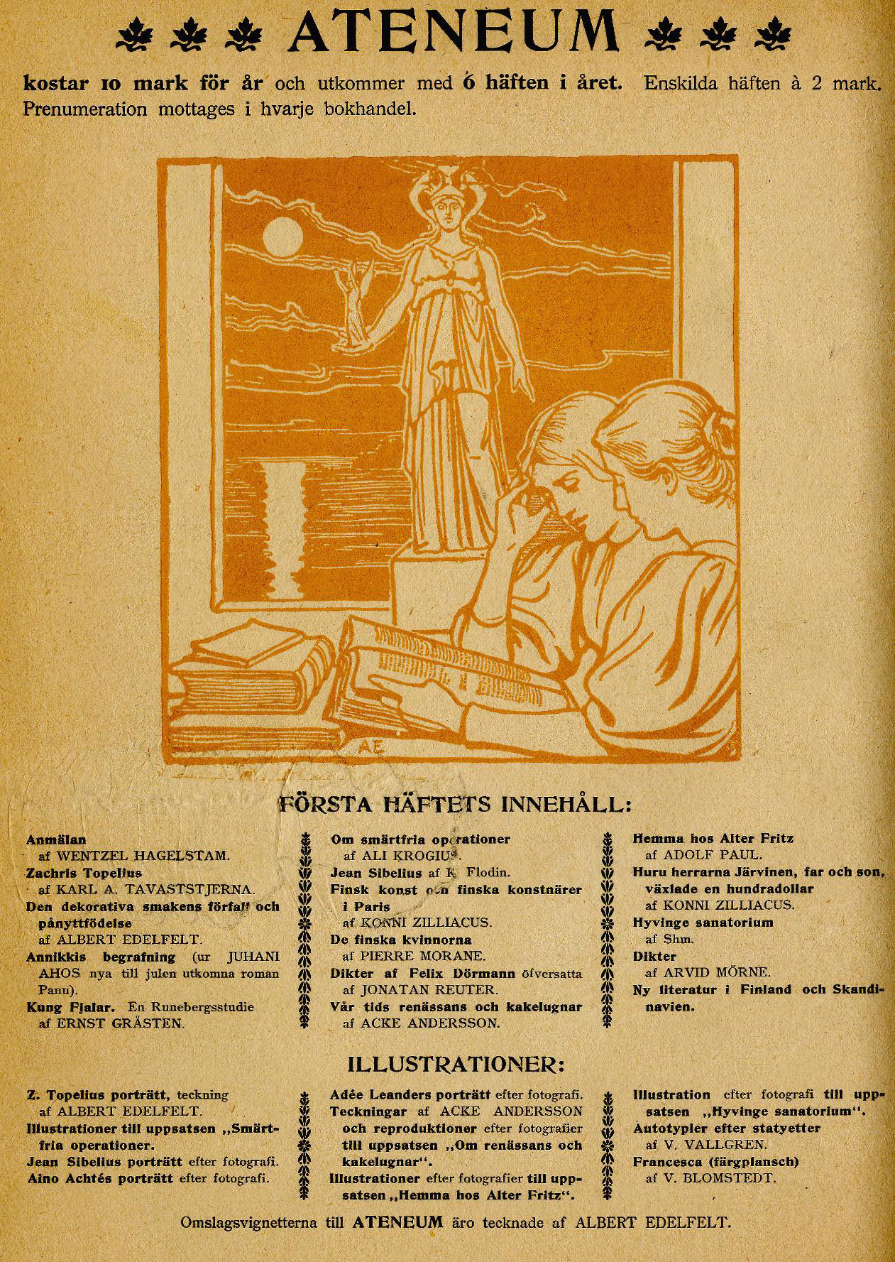 Albert Edelfeltin piirtämää kuvitusta Ateneum-lehden ensimmäisen numeron takakannessa vuodelta 1898.